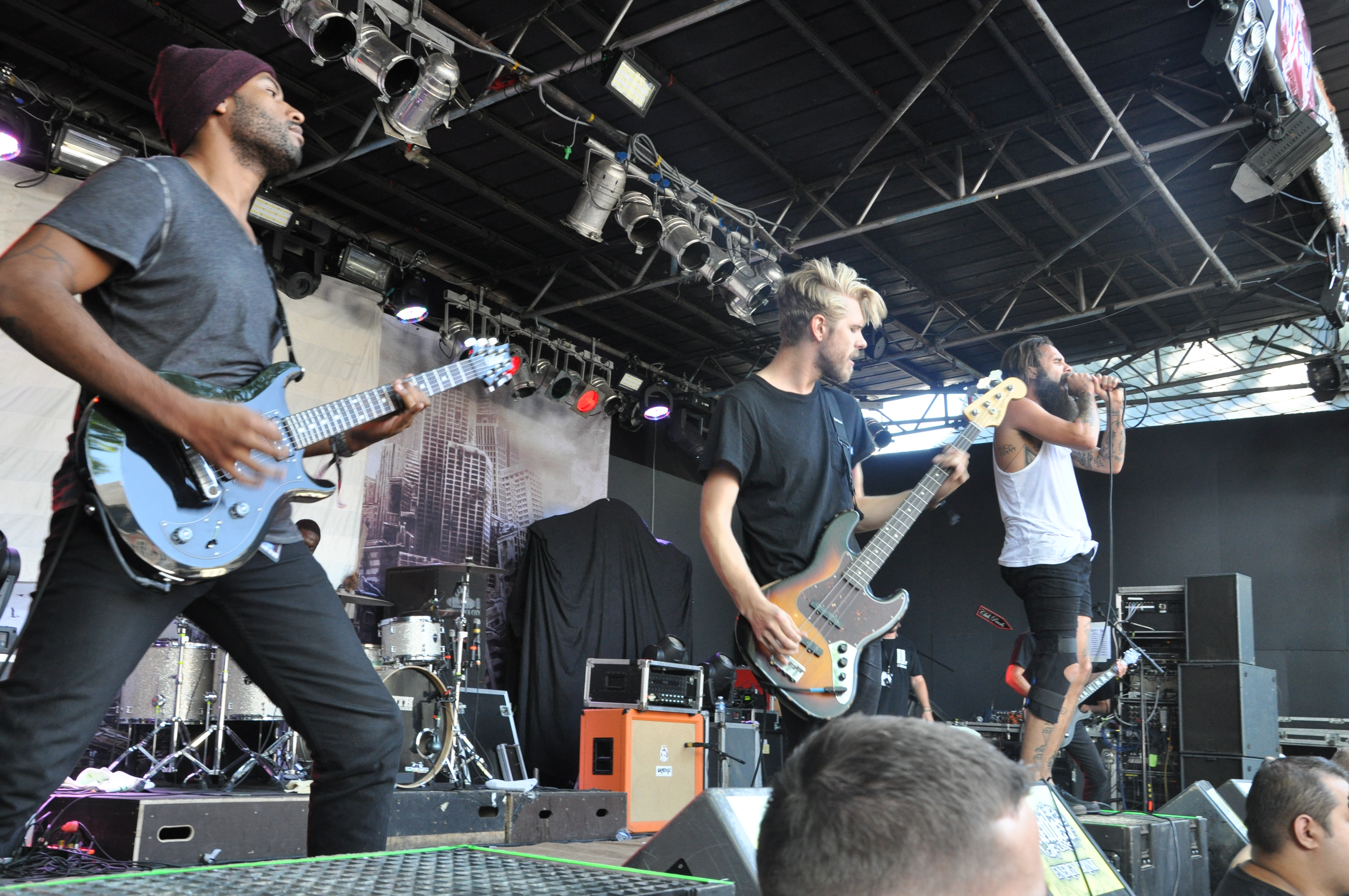 Letlive auf dem Summerblast Festival 2014